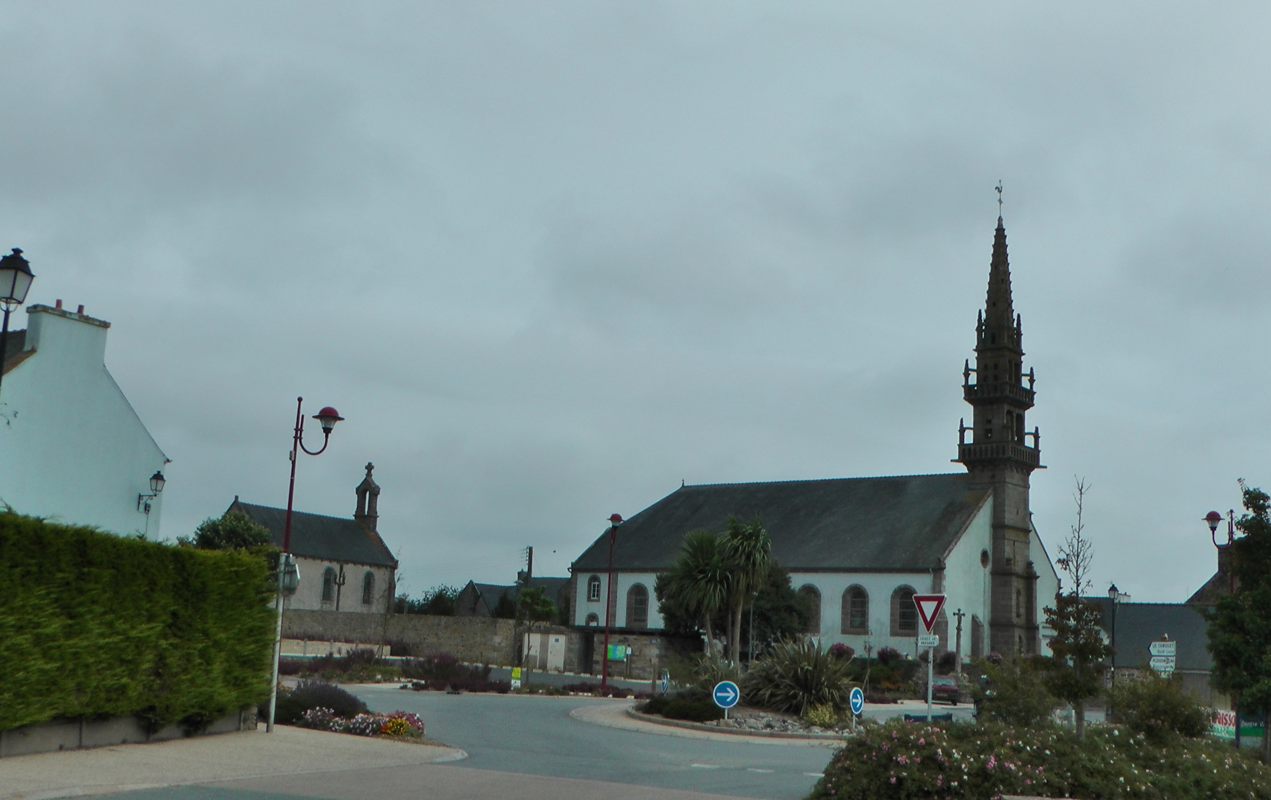 Eglise Saint-Pierre-aux-Liens de Ploumoguer Finistère Bretagne France